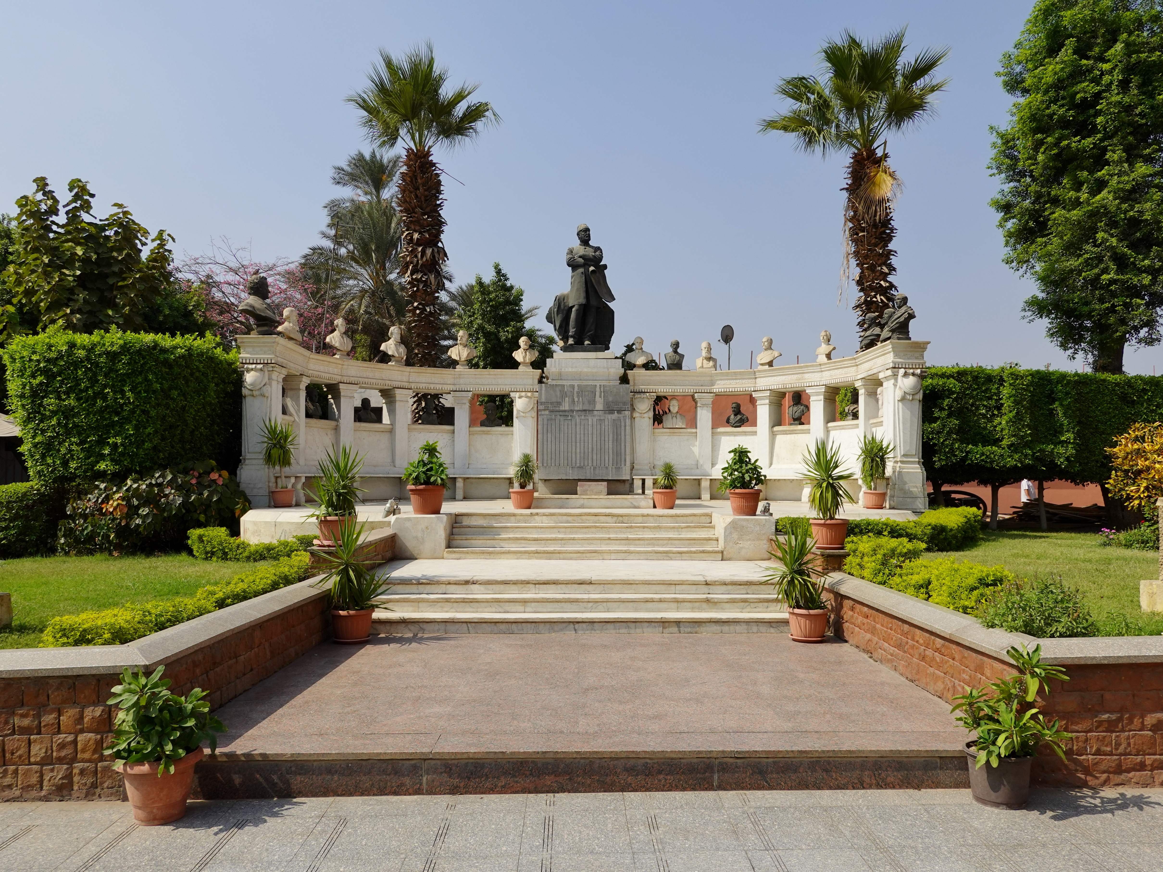 Grab und Denkmal für Auguste Mariette neben dem Ägyptischen Museum in Kairo, Ägypten